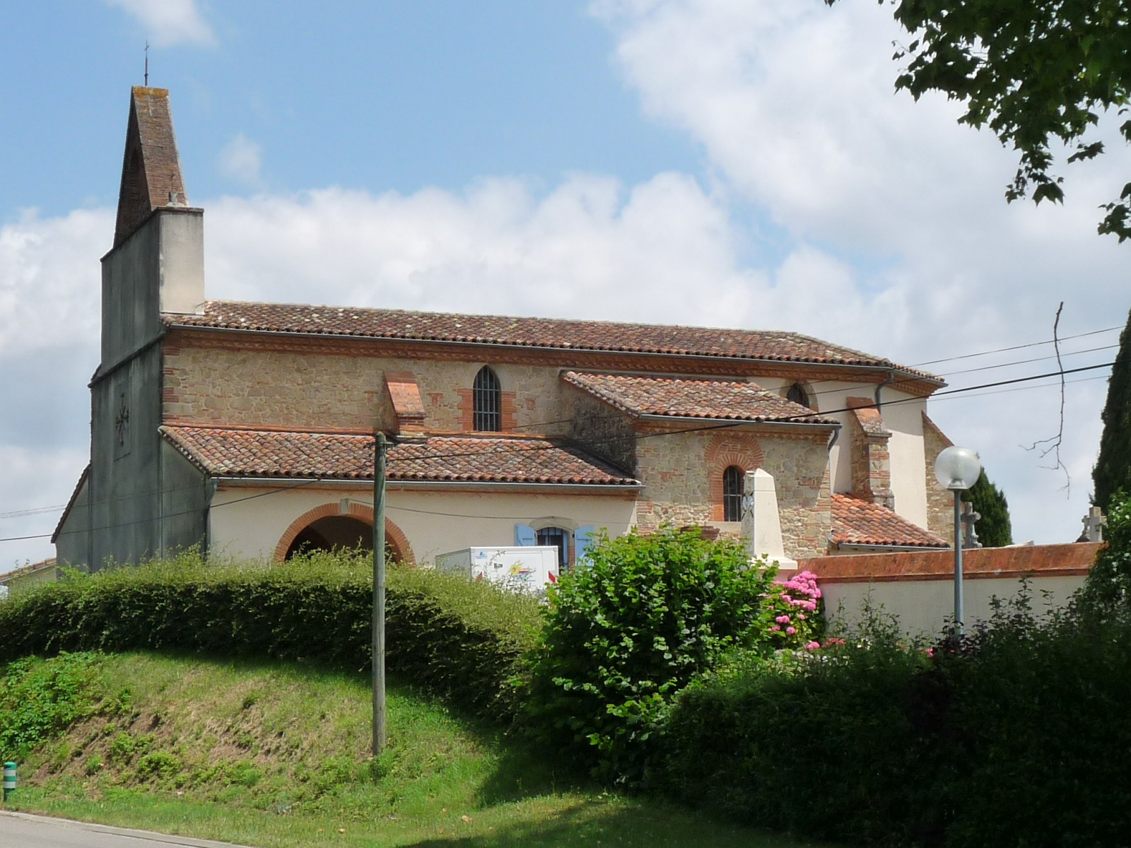 Eglise de Vendine, Haute-Garonne, France